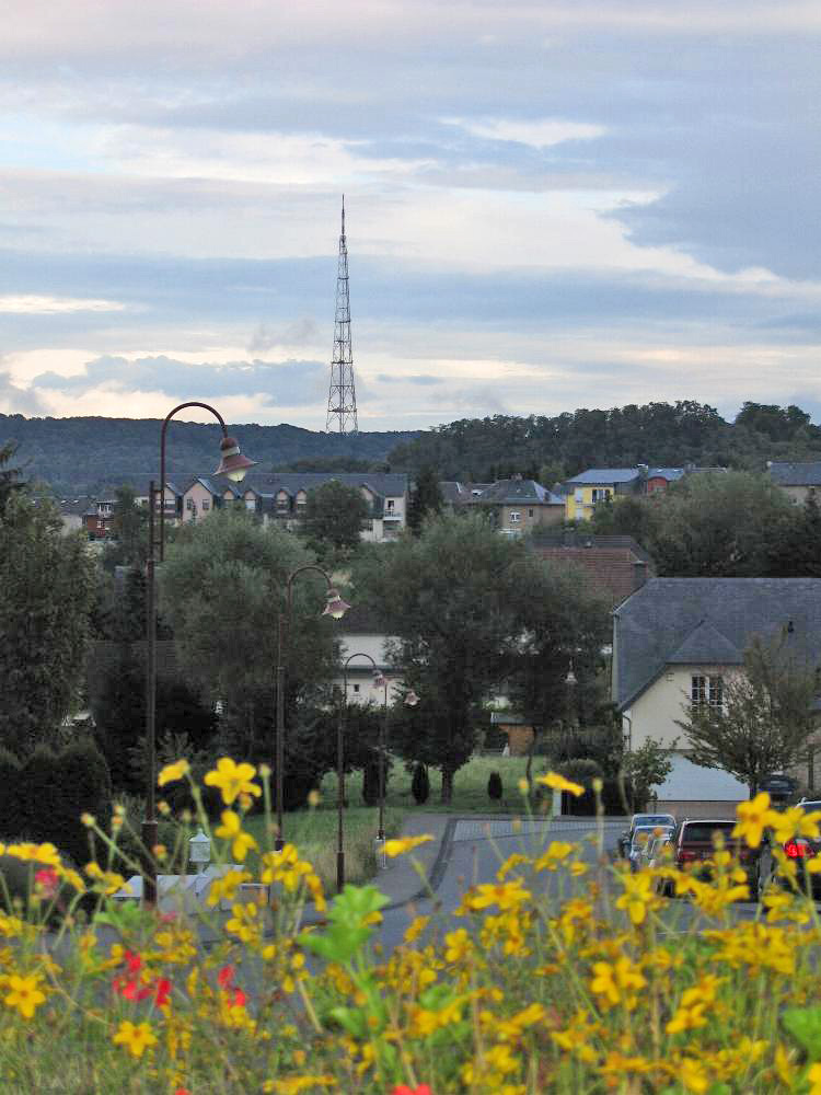 Vue iwwer Butschebuerg op den RTL-Antennepotto